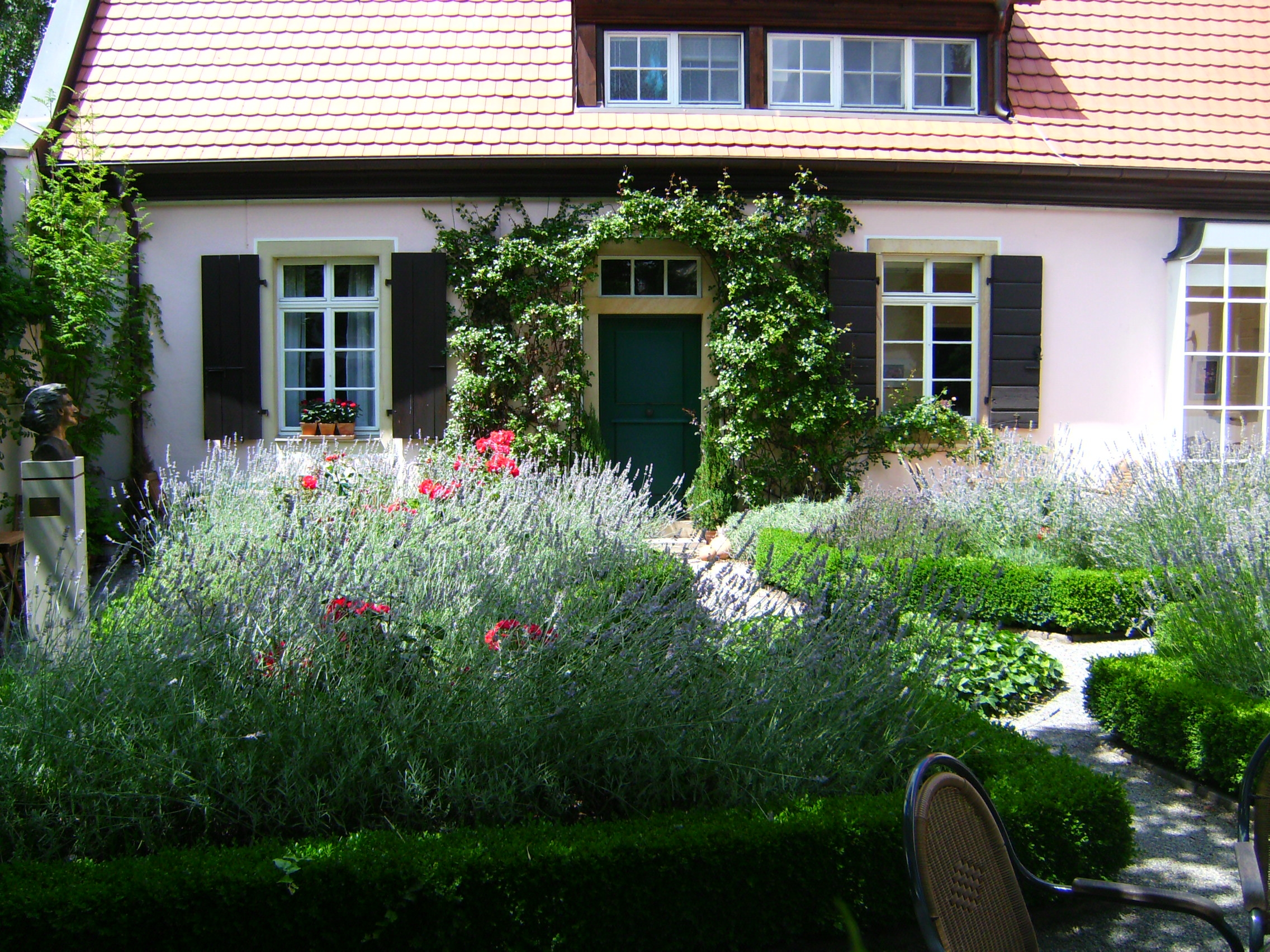 Garten des Feuerbachhauses